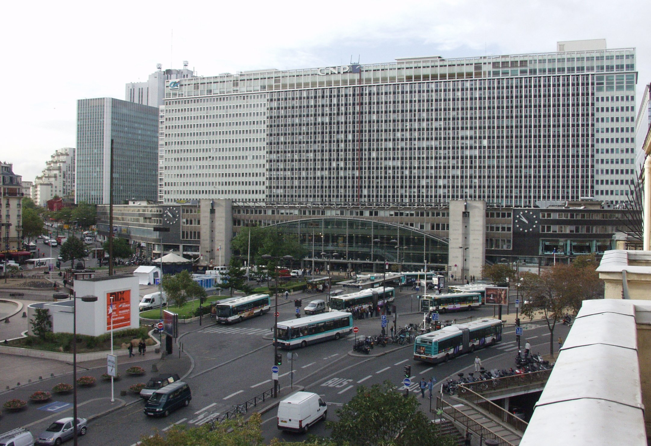 Gare de Paris-Montparnasse.